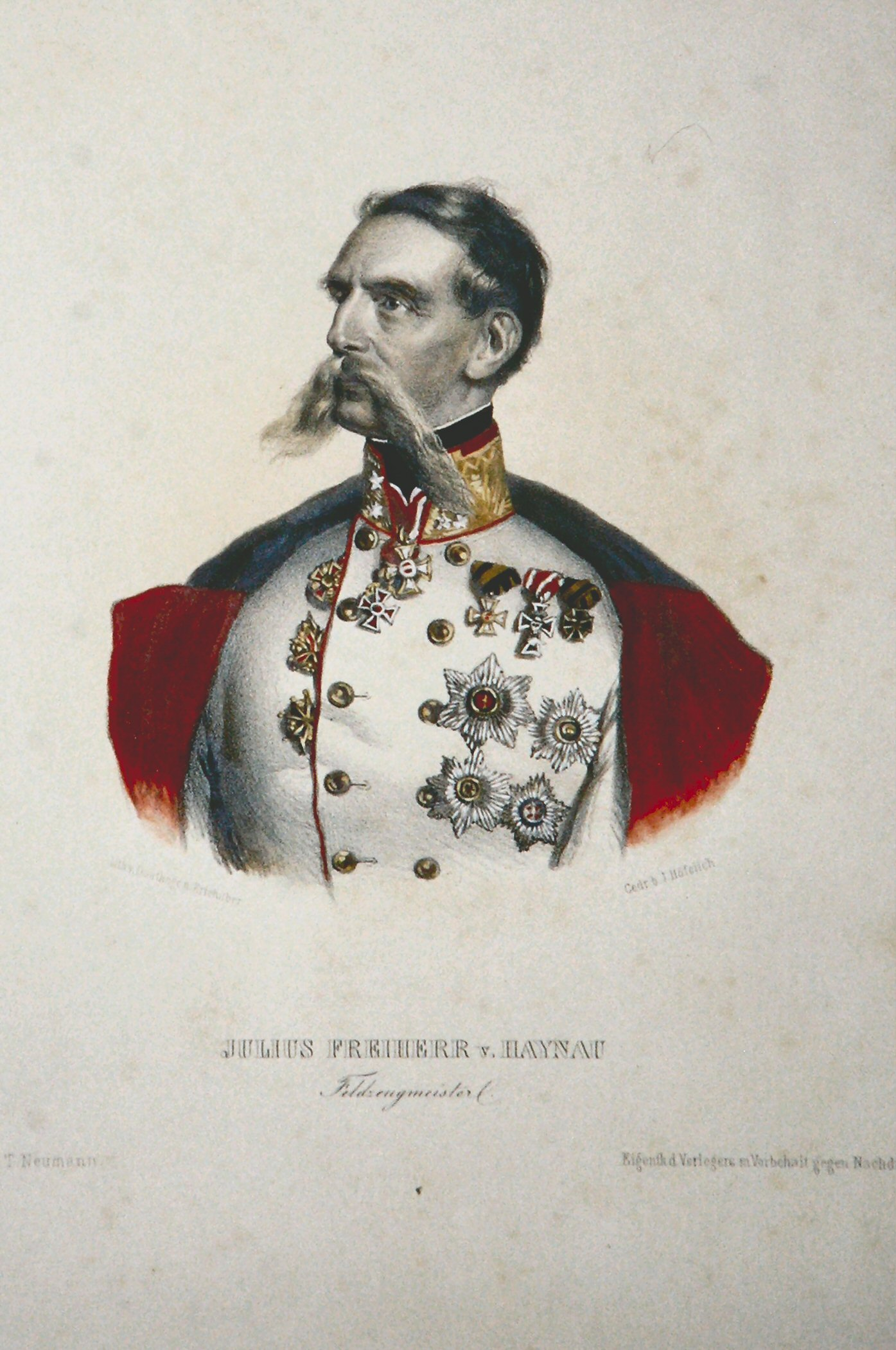 Julius Frreiherr von Haynau (1786-1853), k. k. Feldzeugmeister, Lithographie von Adolf Dauthage nach Kriehuber, ca.1848